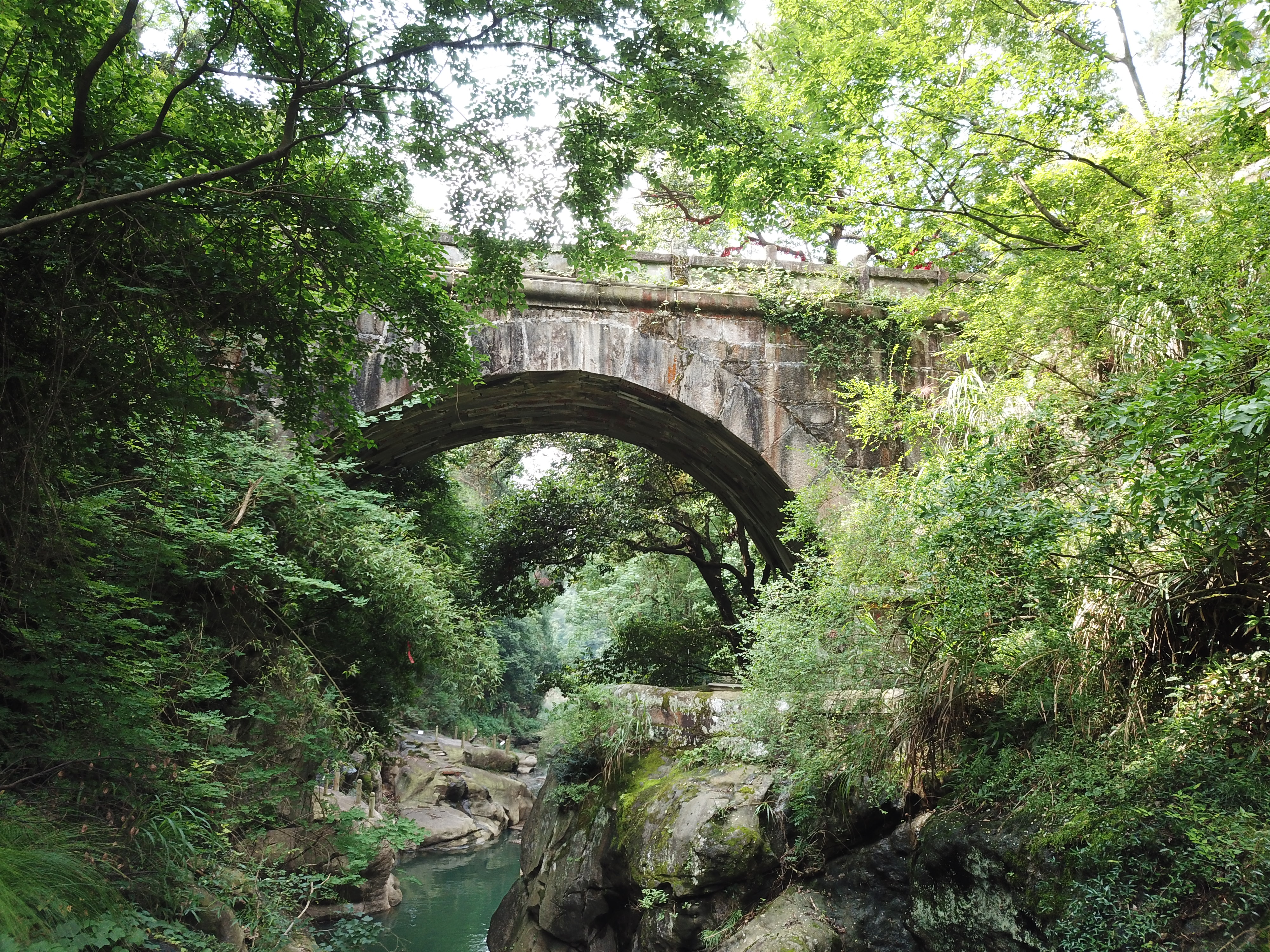 庐山·观音桥 北面